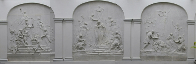 Relief "Lebensstufen" im Deutschen Versicherungsmuseum in Gotha